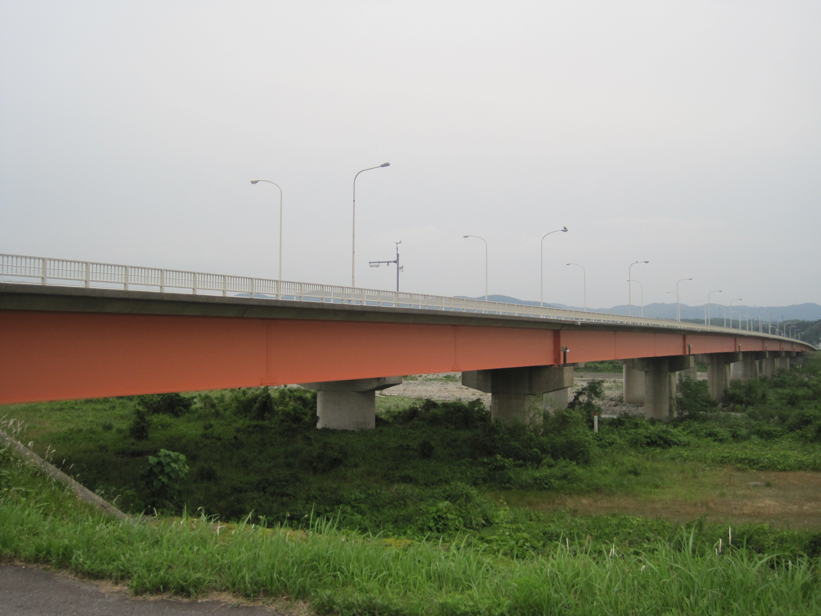 川北大橋有料道路の主要部分である川北大橋（石川県能美郡川北町）。2013年3月31日より無料化された。